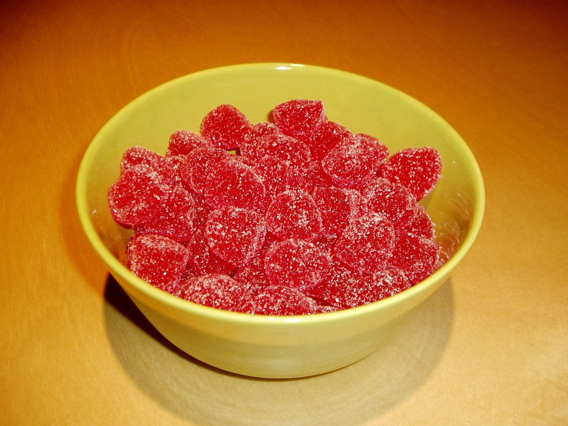 Geléhallon